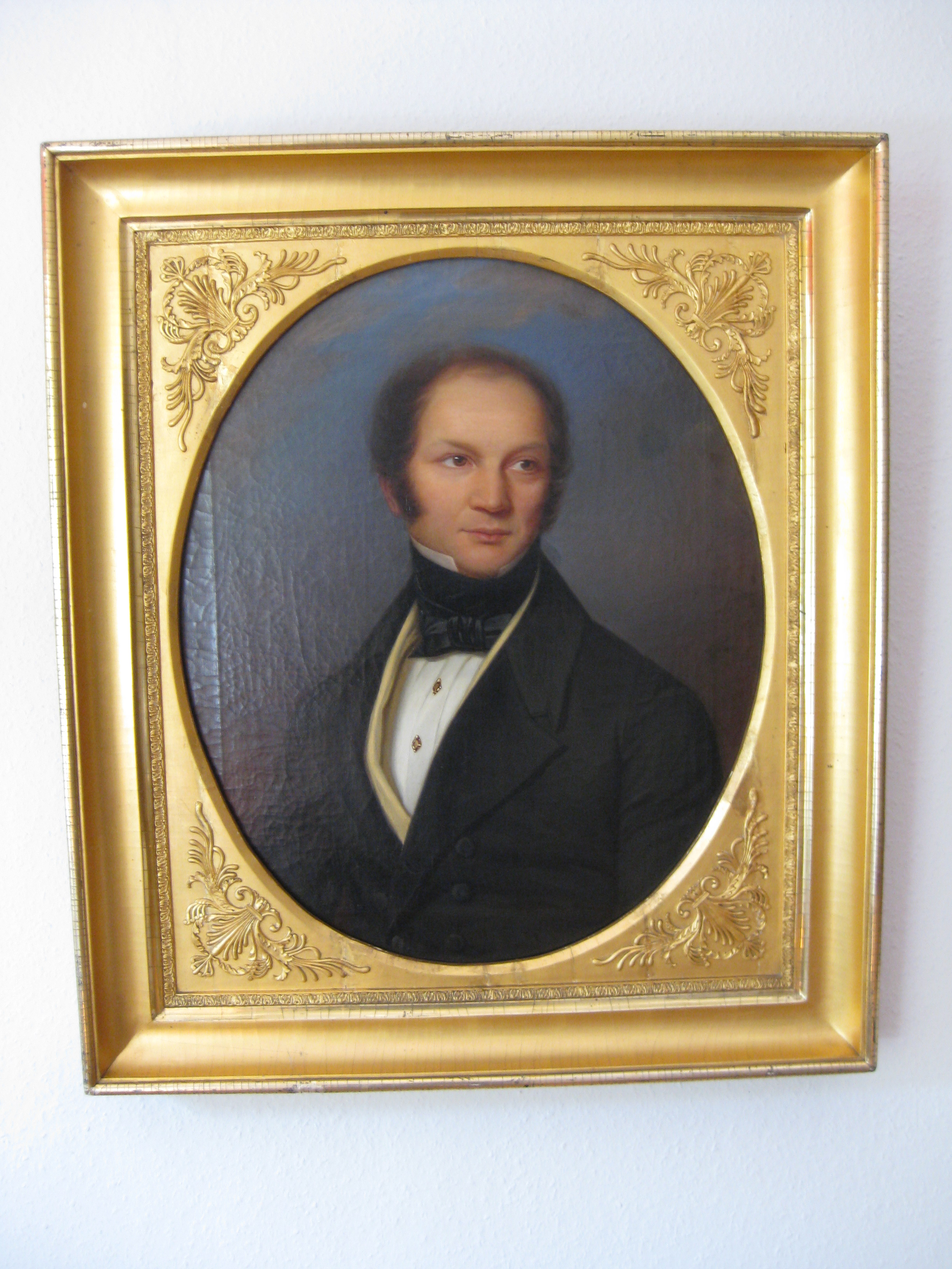 Portrait aus dem 19. Jahrhundert